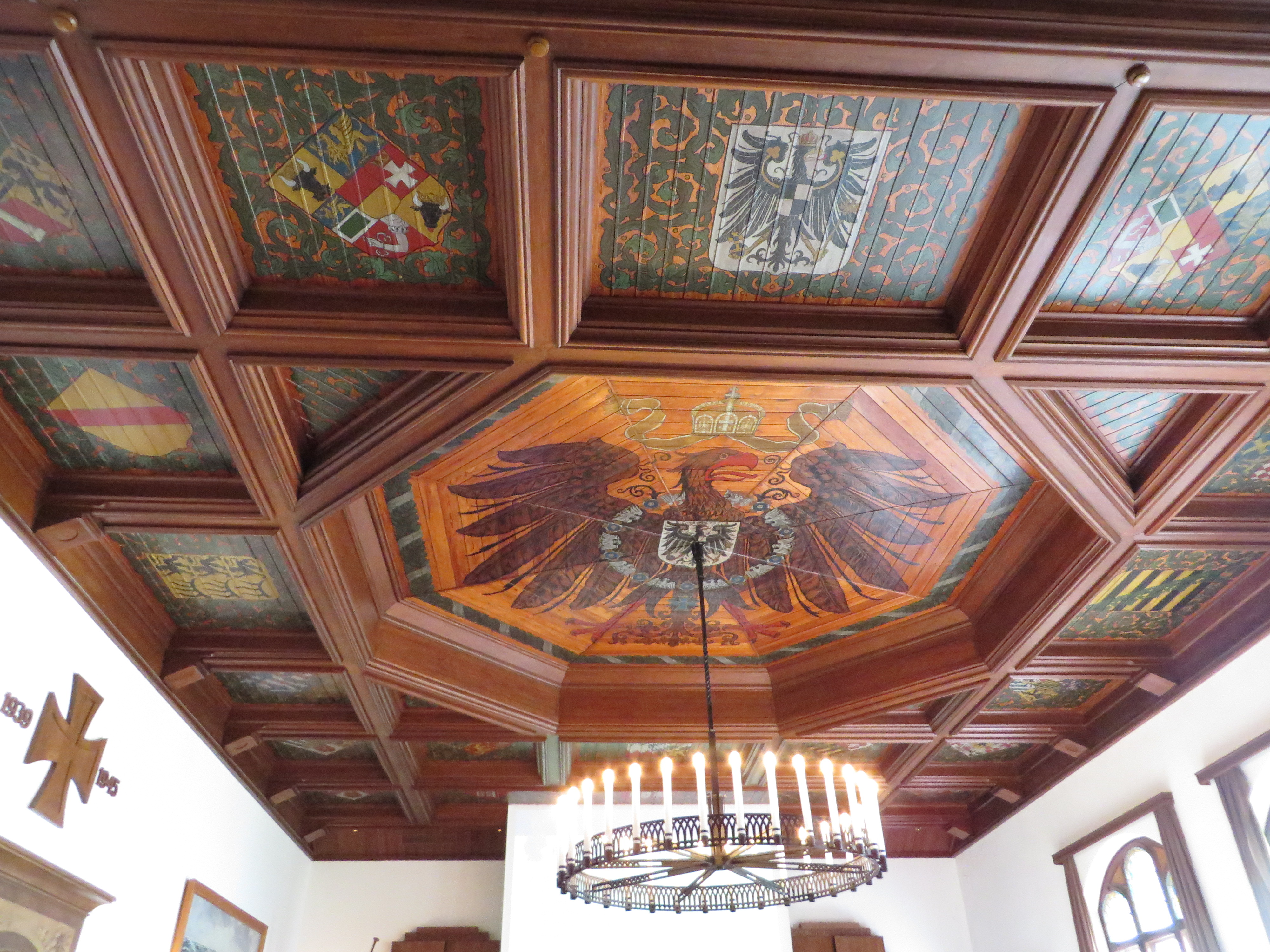 Adler-Wappen-Decke der MSM (Flensburg-Mürwik Mai 2015), Bild 04